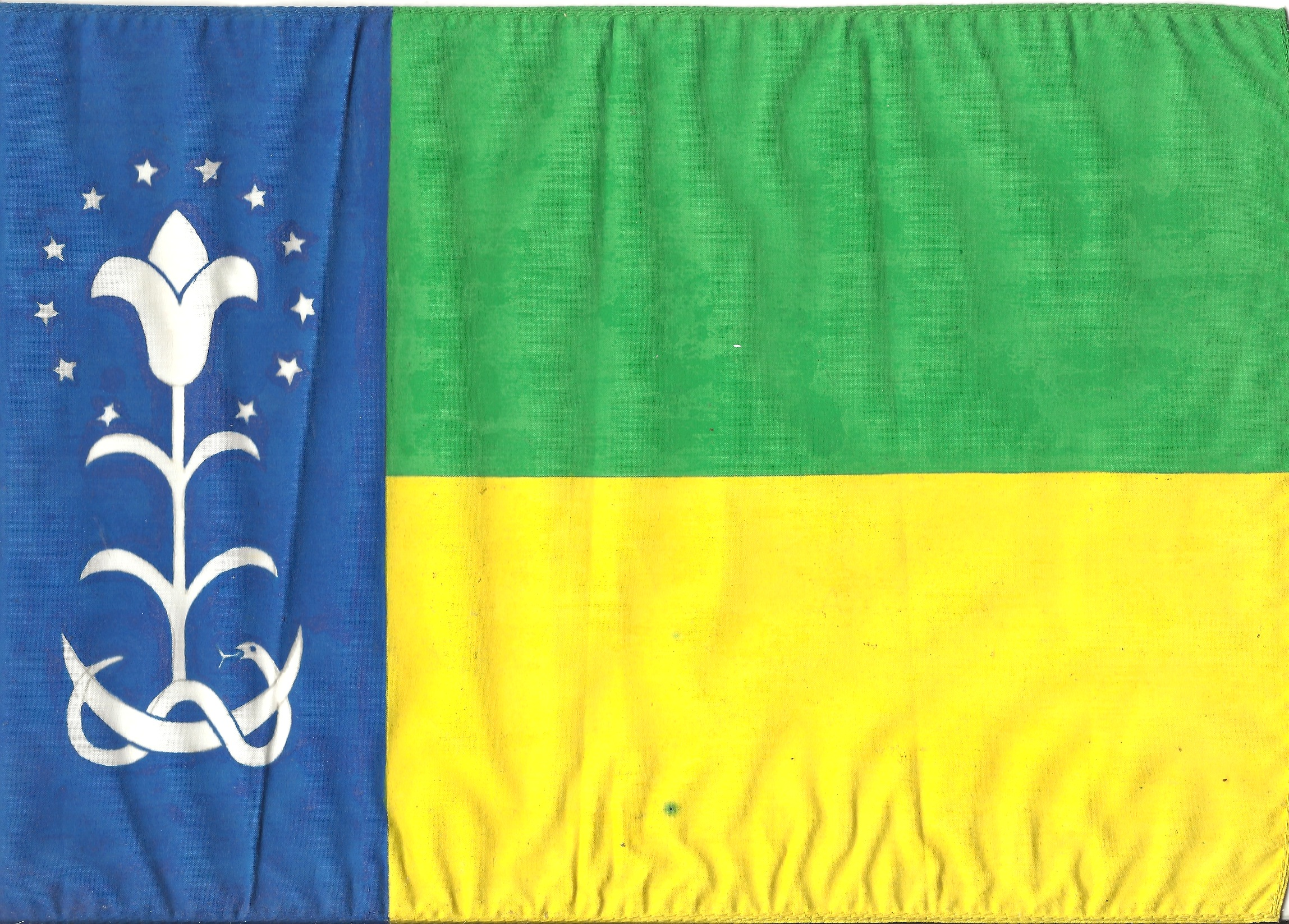 Bandeira da Cidade de Arauá - Sergipe